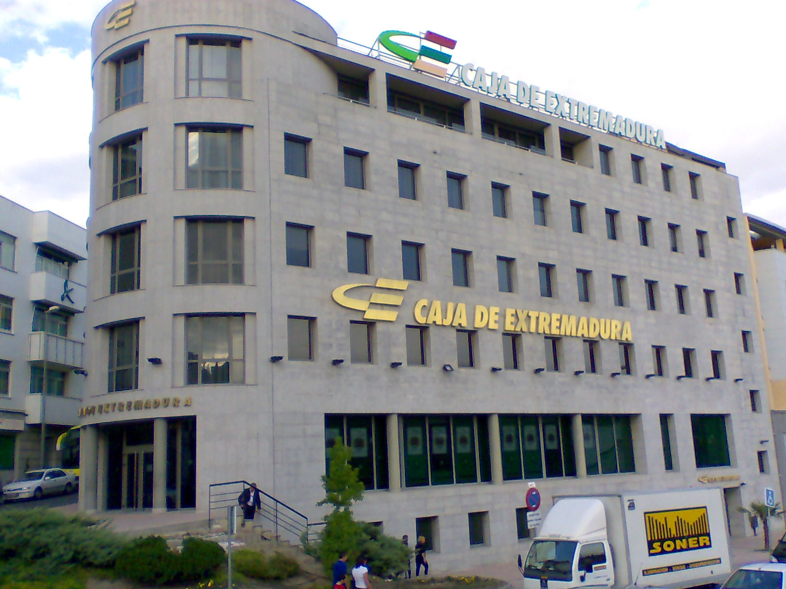 Oficinas de Caja Extremadura en Plasencia